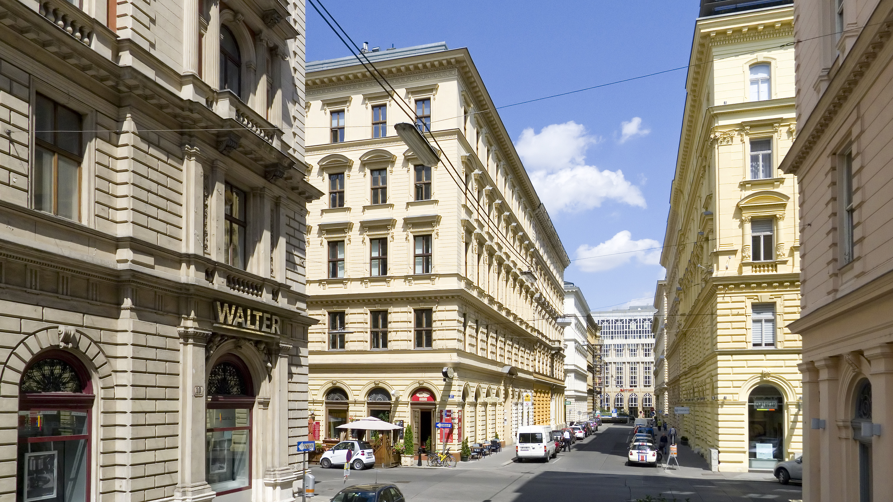 Hegelgasse in Wien 1 bei Nr. 10 Richtung Nordosten